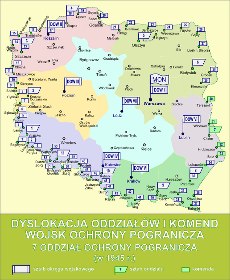 Dyslokacja oddziałów i komend Wojsk Ochrony Pogranicza - 7 Oddział Ochrony Pogranicza w 1945 r.